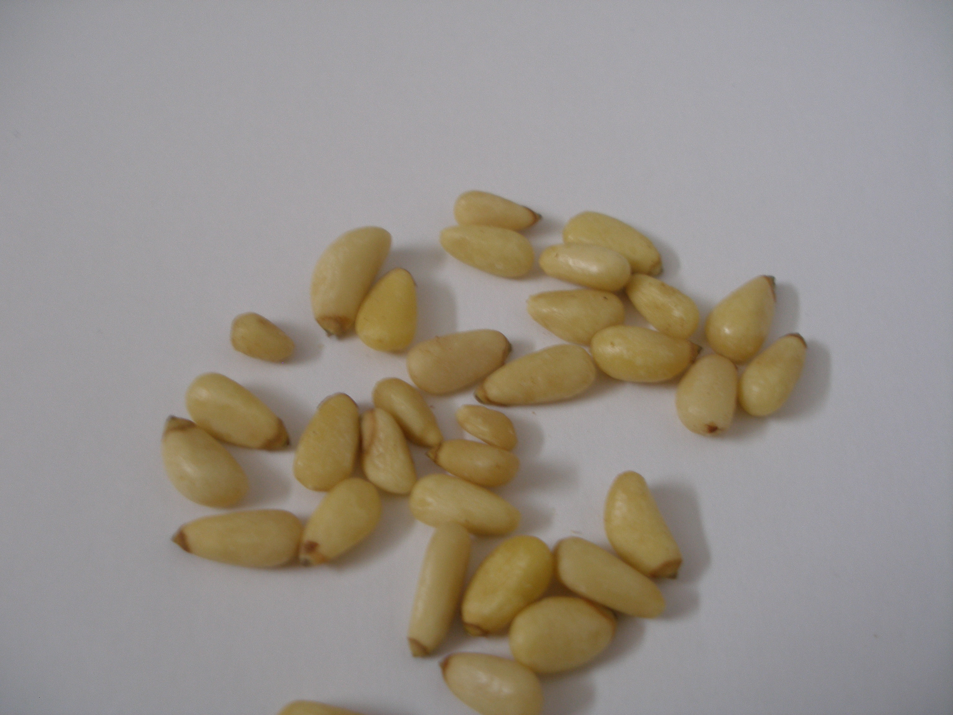 Pinus pinea seed